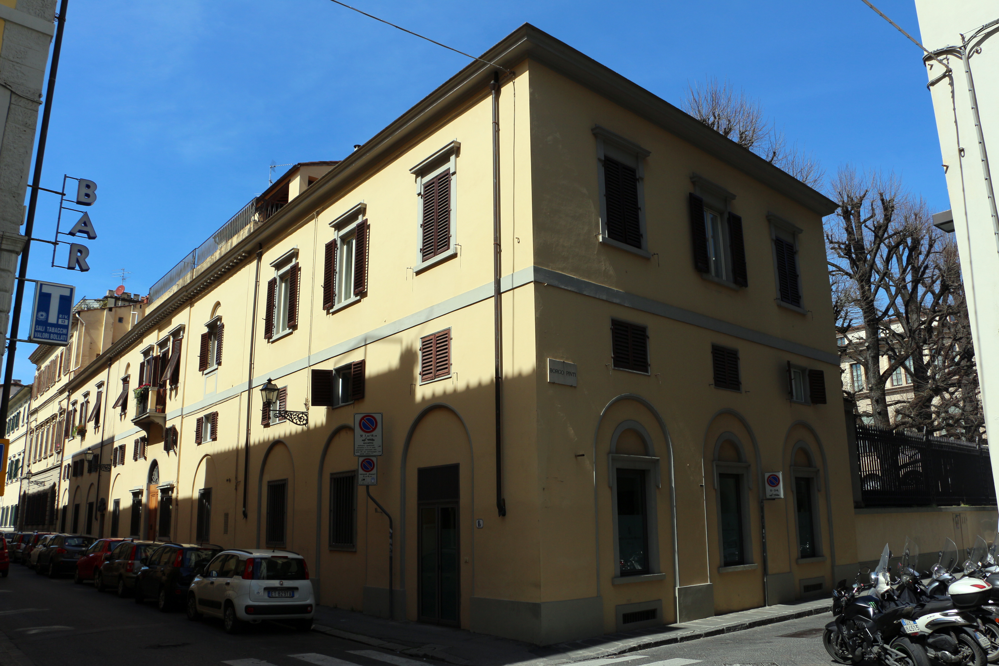 Firenze, miscellanea